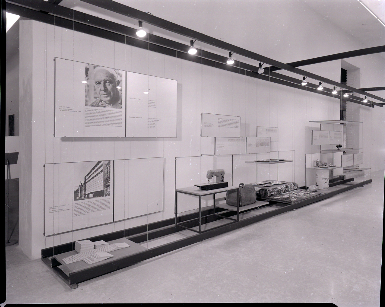 Premio La Rinascente Compasso d'Oro per l'estetica del prodotto, III edizione, 1956. Esposizione degli oggetti partecipantial concorso. Servizio fotografico : Milano, 1970 / Paolo Monti. - Buste: 11, Fototipi: 10 : Negativo b/n, gelatina bromuro d'argento/ pellicola ; 10x12. - ((Serie costituita da 10 negativi identificati con i nn.: 5808-5817. Numerazione parallela: 66. La suddetta serie è contenuta nella scatola identificata con la numerazione G5692/5817. Sul coperchio della scatola manoscritto: "Rinascente 2". - Fonte: Rubrica di Paolo Monti: Archivio 10x12 (ultimi numerati) - dal G1 al (s.d.), presso Archivio Paolo Monti